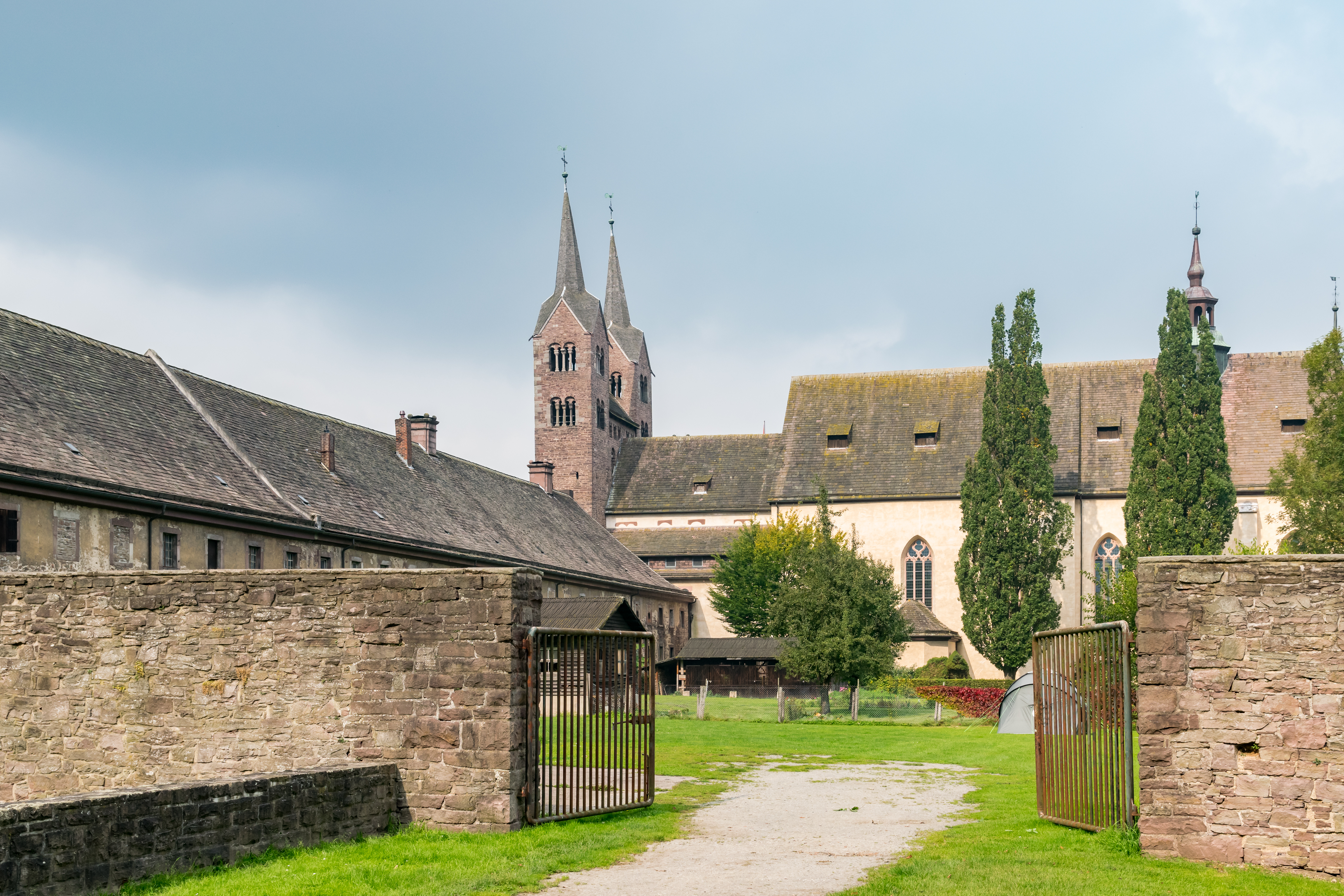 Domänengebäude und Abteikirche, Schloß Corvey, Höxter